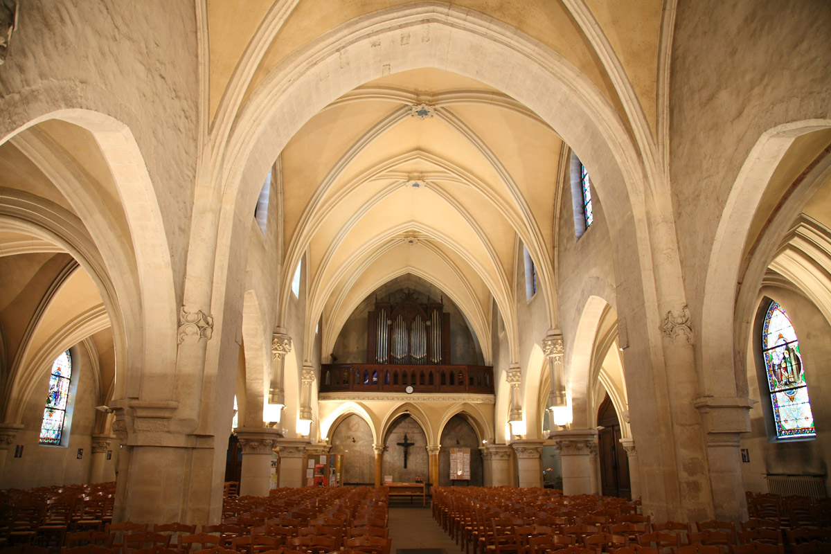 Intérieur de l'église St Saturnin. Photographie Mathieu Génon